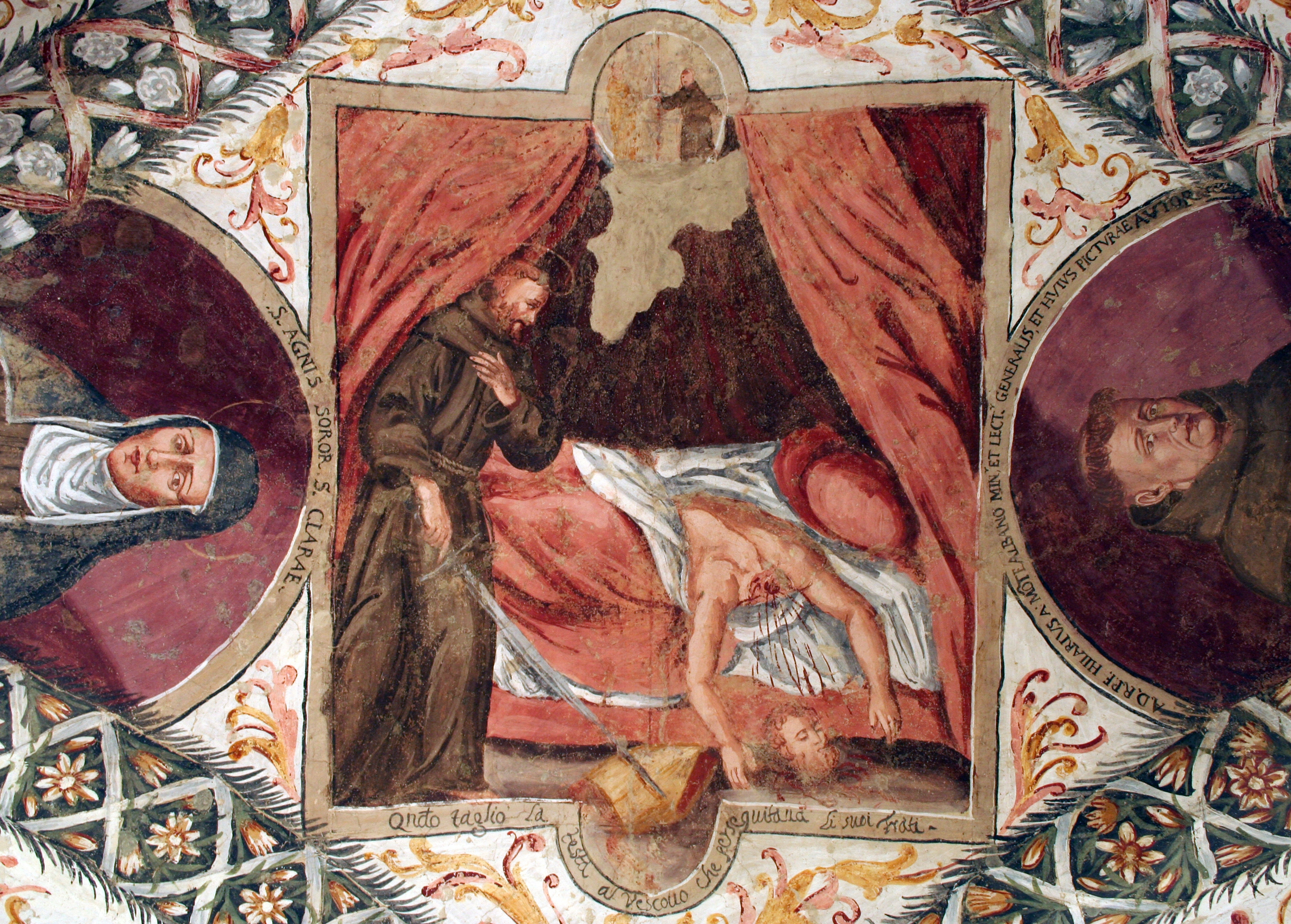 Autore:Rocco Stasi. Fonte: fatta da me. Descrizione: Convento di S. Antonio di Padova (1491) - quadriportico - affreschi realizzati dal pittore tricaricese Cesare Scerra tra il 1647 ed il 1650. Raffigurazione metaforica di una scena di vita di S. Francesco d'Assisi.